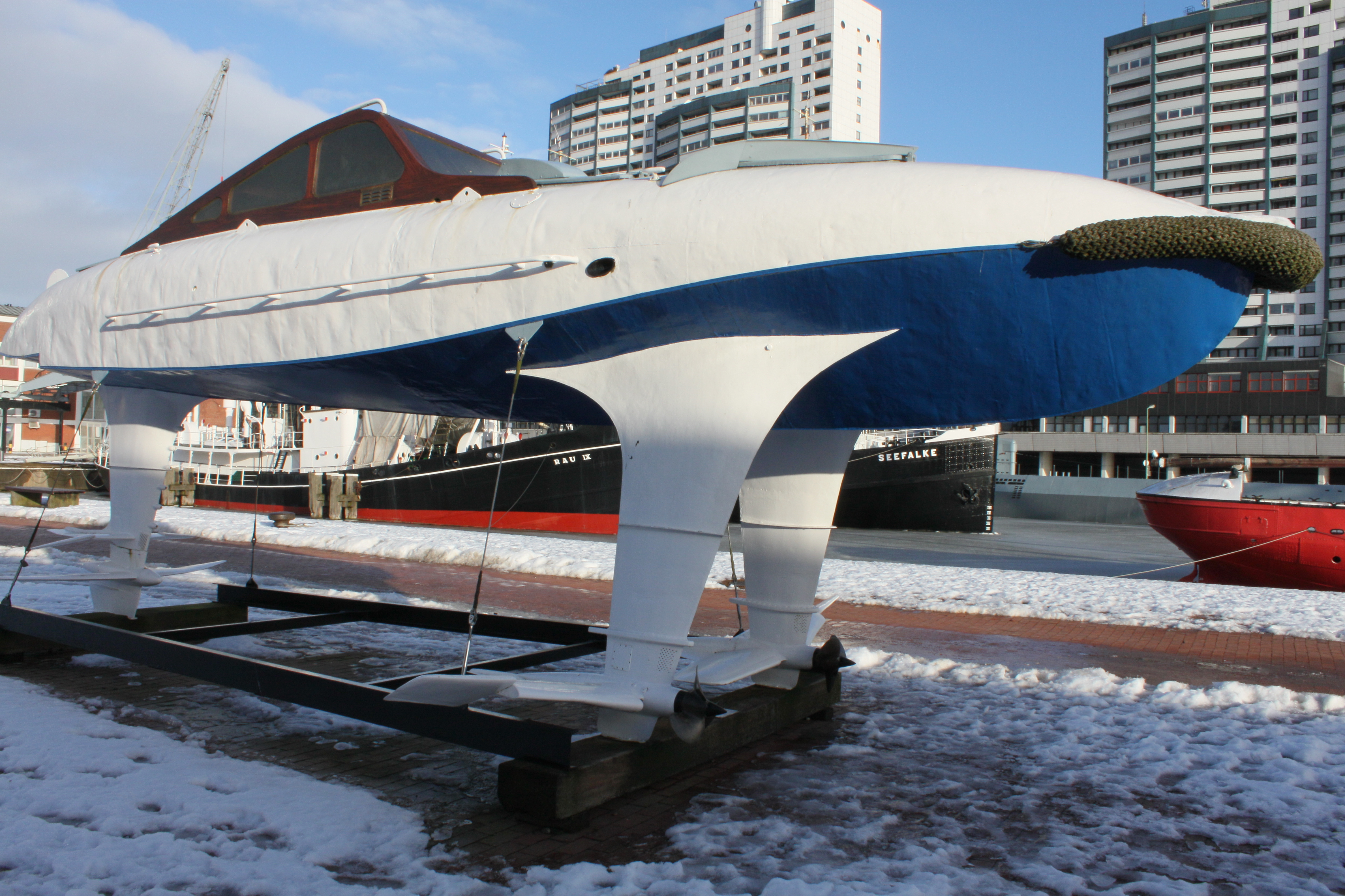 Deutsches Schiffahrtsmuseum - Außenbereich German Maritime Museum Native nameDeutsches SchiffahrtsmuseumLocationHans-Scharoun-Platz 1 27568 Bremerhaven GermanyCoordinates53° 32′ 24″ N, 8° 34′ 37″ E Established5 September 1975WebsiteDeutsches SchiffahrtsmuseumAuthority control : Q455354 VIAF: 128715457 ISNI: 0000 0001 2256 5668 LCCN: n50065866 NLA: 35745010 GND: 2008892-9 SUDOC: 03004622X BNF: 12154219k WorldCat